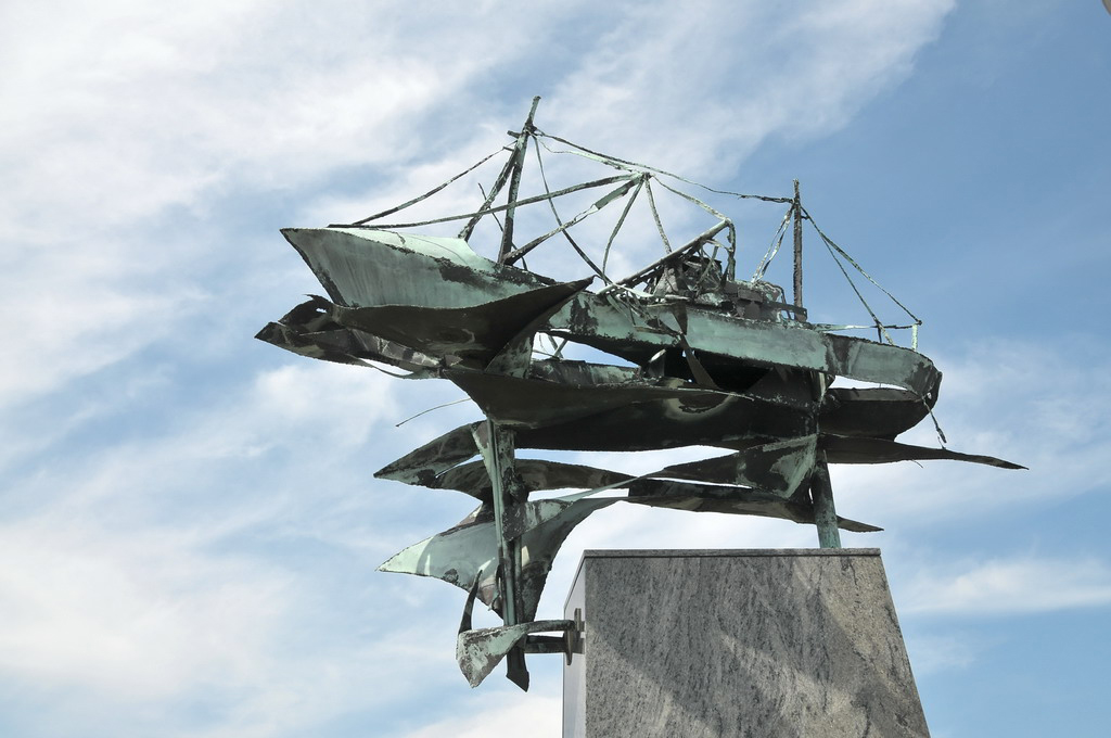 'Zeven maal over de zeeën te gaan Schraal in de kleren, Wat zou het mij deren, Kon ik uit de dood die éne doen keren Zeven maal over de zeeën te gaan Zeven maal, om naast jou te staan' Ida Gerhardt Bij de nieuwbouw van de toenmalige gemeentelijke visafslag in Den Helder werd een kunstwerk van de hand van Louk van Meurs - Mauser (Hengelo 1929) op het dak geplaatst. Toen Peter Wijnants het initiatief nam voor een monument voor de op zee gebleven vissers, waaronder zijn broer Cees, is gebruik gemaakt van dit kunstwerk. I.v.m. een uitbreiding van de afslag moest dit toch ook verplaatst worden. Op 12 juni 1999 werd het monument door Peter Wijnants onthuld.